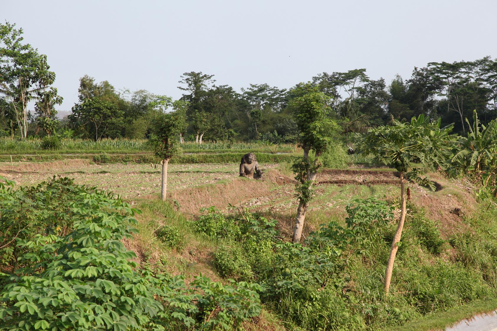 Candi Tapan / Situs Bendosewu (Tapan Temple)